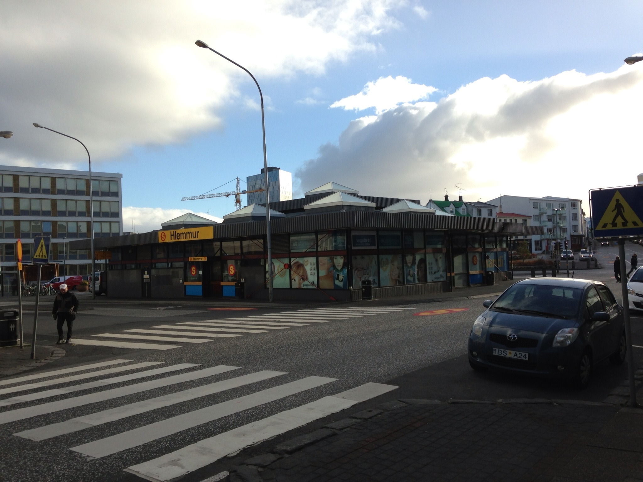 Hlemmur bus terminl